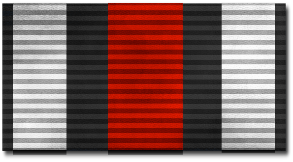 Saksan maailmansotaan osallistuneiden kunniaristi nauha (ensimmäinen maailmansota)